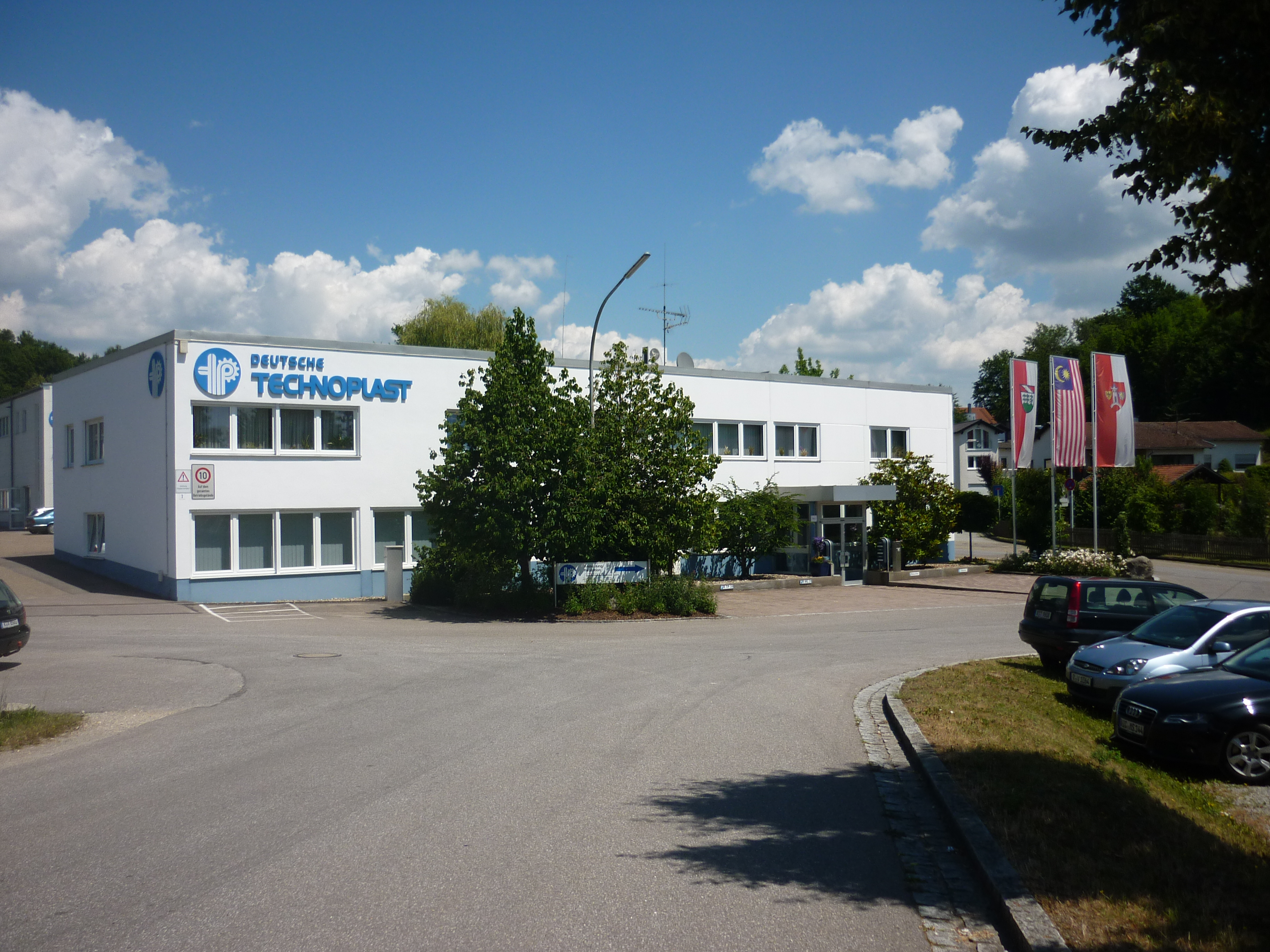 Deutsche Technoplast Wörth a.d.Donau Hauptsitz Wörth